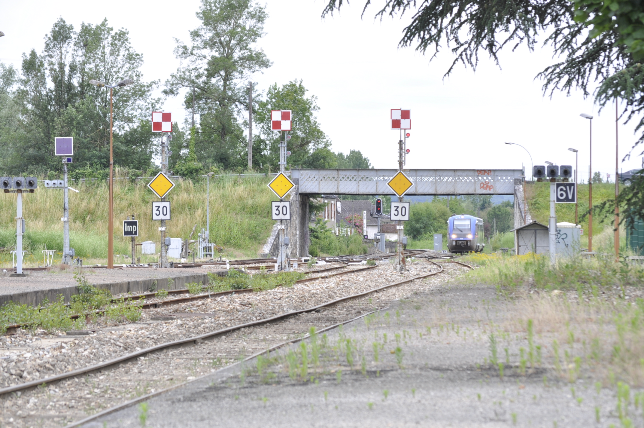 Signalisation mécanique en gare de Saint-Denis-près-Martel. Cette signalisation inclus: un carré violet, et trois mats comportant un carré et un avertissement